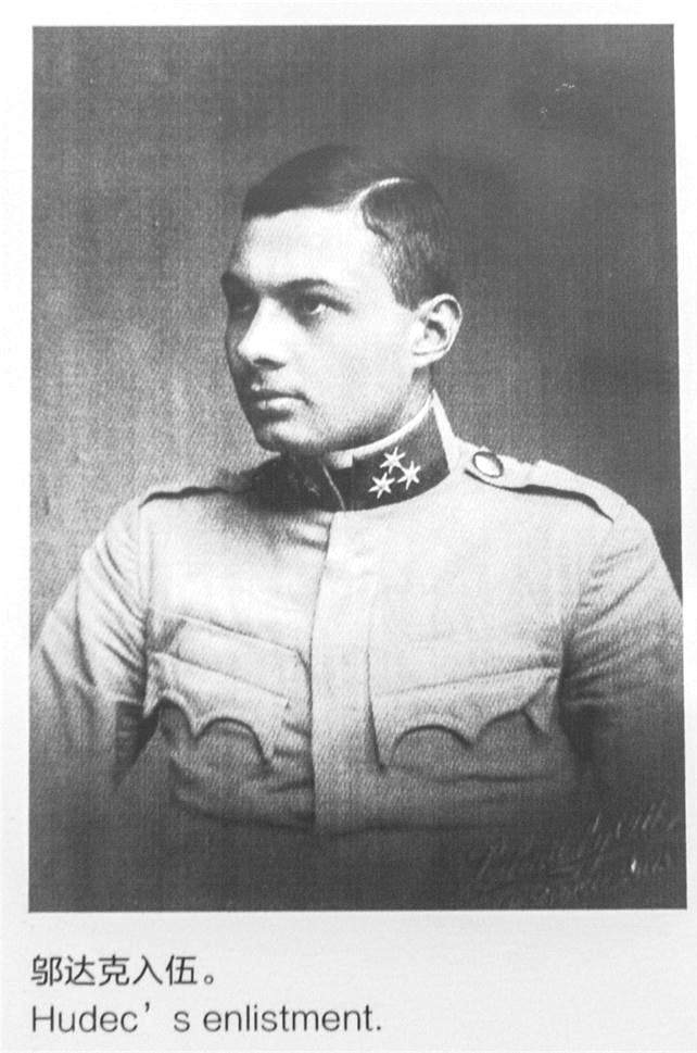 Hugyecz László, a magyar hadsereg önkéntese. 1916-ban, az első világháború egy ütközetében lábsérülést szenvedett, amikor is az orosz hadsereg kozák lovassága foglyul ejtette. Szibériába vitték, ahol – komoly építészeti munkákban vehetett részt. Egy fogoly-áttelepítés során – a fehérek és vörösök között javában dúló polgárháború véres eseményei elől menekülve –, 1918-ban, a kínai határ közelében, leugrott a mozgó vonatról és kalandos körülmények között sikeresen átjutott Kínába.